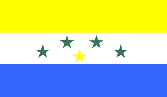 Bandera del municipio Mariño, estado Sucre, Venezuela